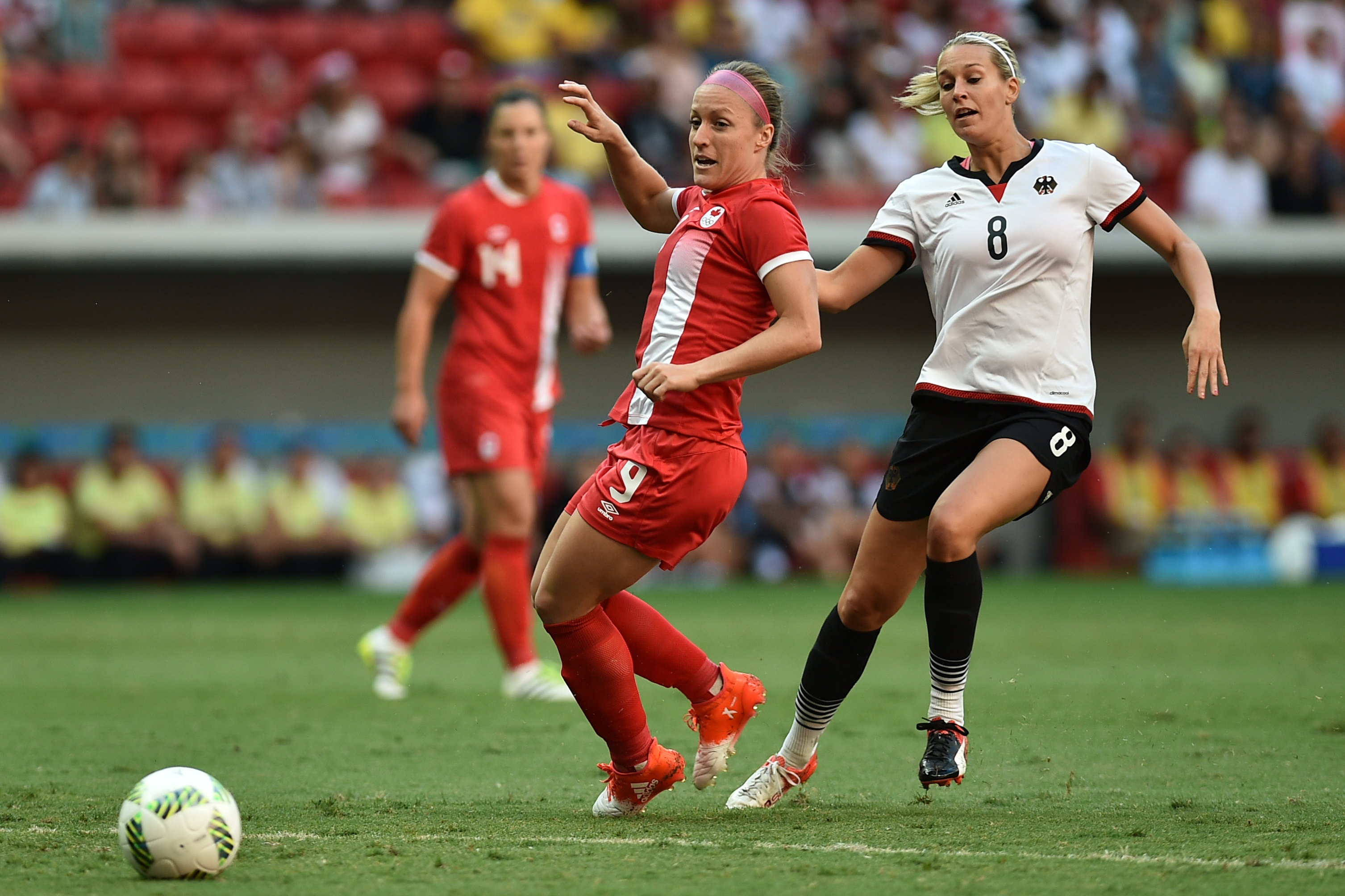 Estádio Nacional de Brasília Mané Garrincha, Brasília, DF, Brasil, 9/8/2016 Foto: Andre Borges/Agência Brasília Alemanha e Canadá jogam nesta terça-feira (9), no Estádio Mané Garrincha, pelo grupo F do futebol feminino nas Olimpíadas 2016.